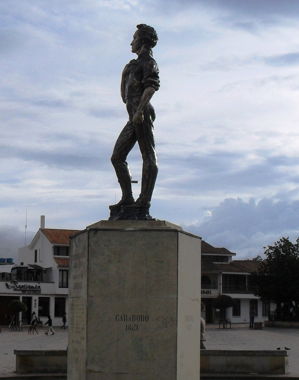 Estatua de Simón Bolívar en la plaza del mismo nombre, en la ciudad de Chiquinquirá Boyacá, Colombia